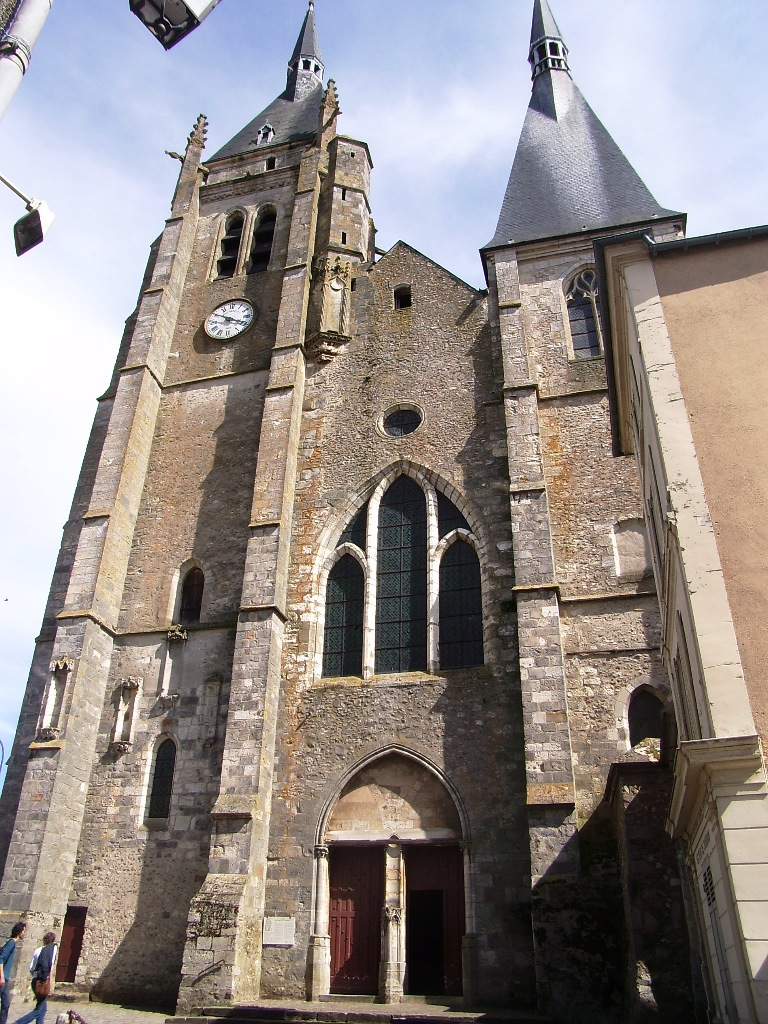 Façade de l'église Saint-Germain-d'Auxerre